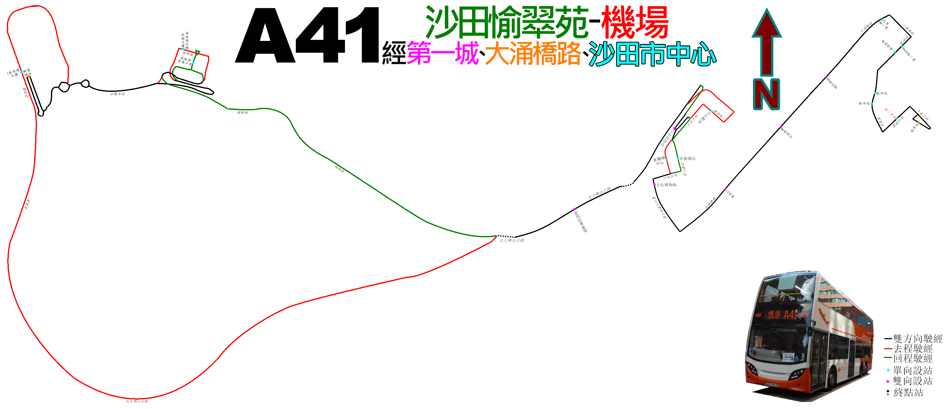 中文（香港）: 龍運巴士A41線的走線圖